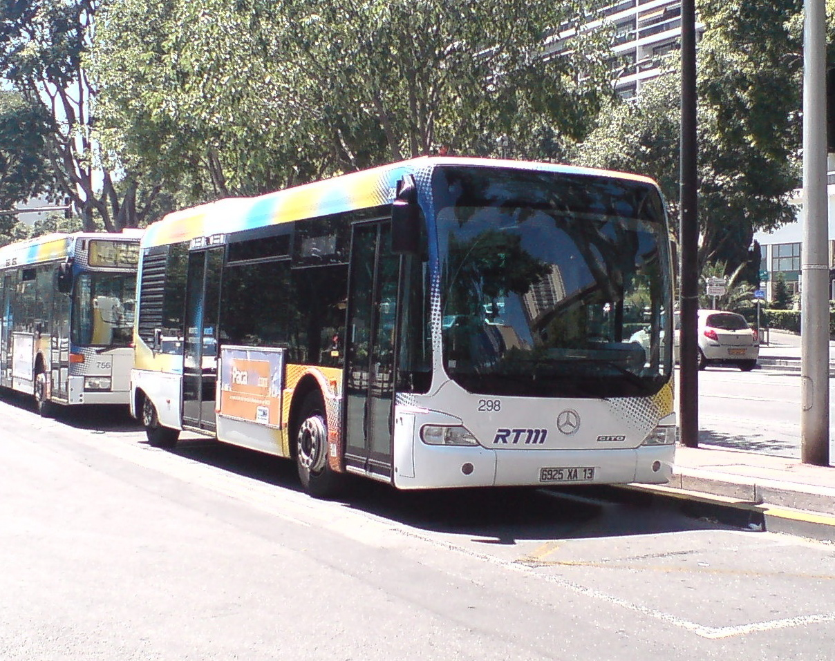 Mercedes-Benz Cito (2000) - attitré dépôt Capelette.